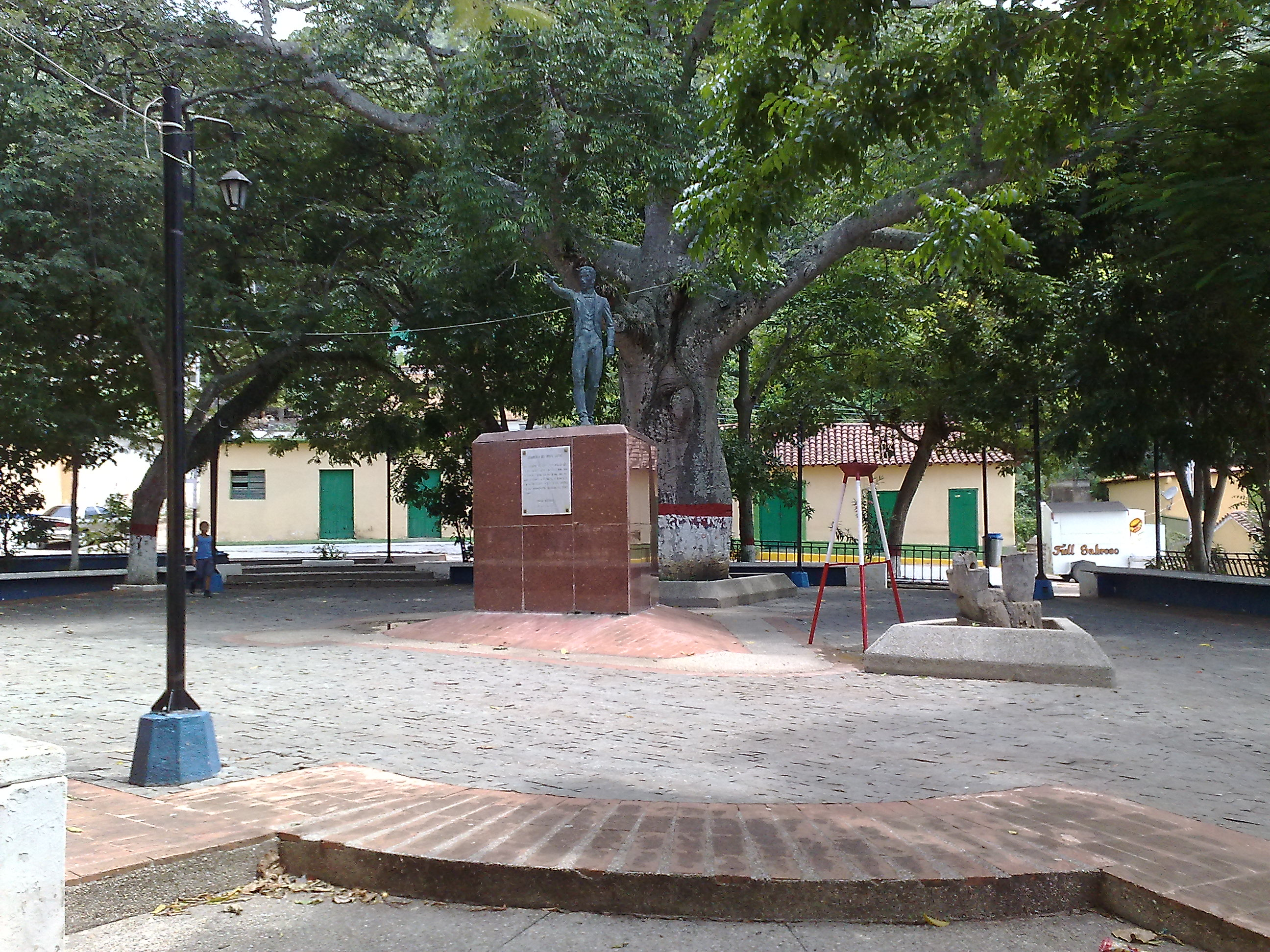 Plaza Bolívar de San Luis.